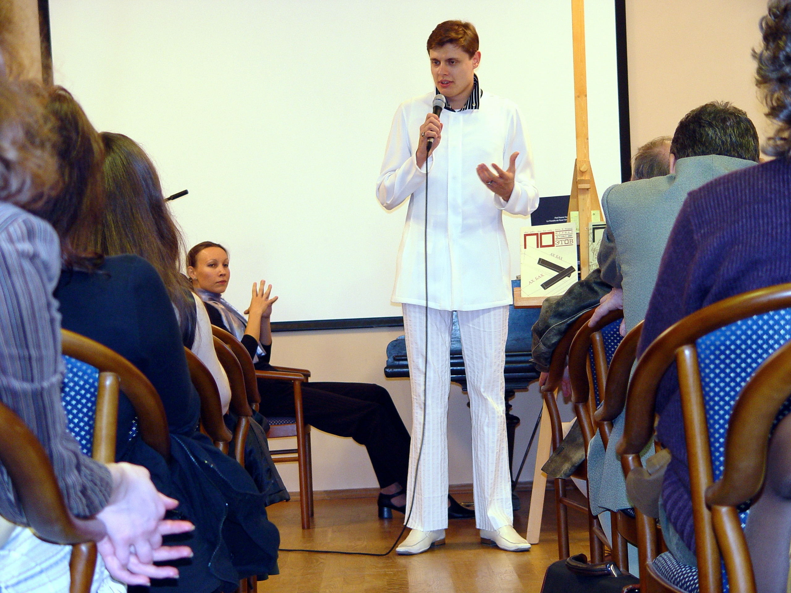 Выступление на поэтическом вечере